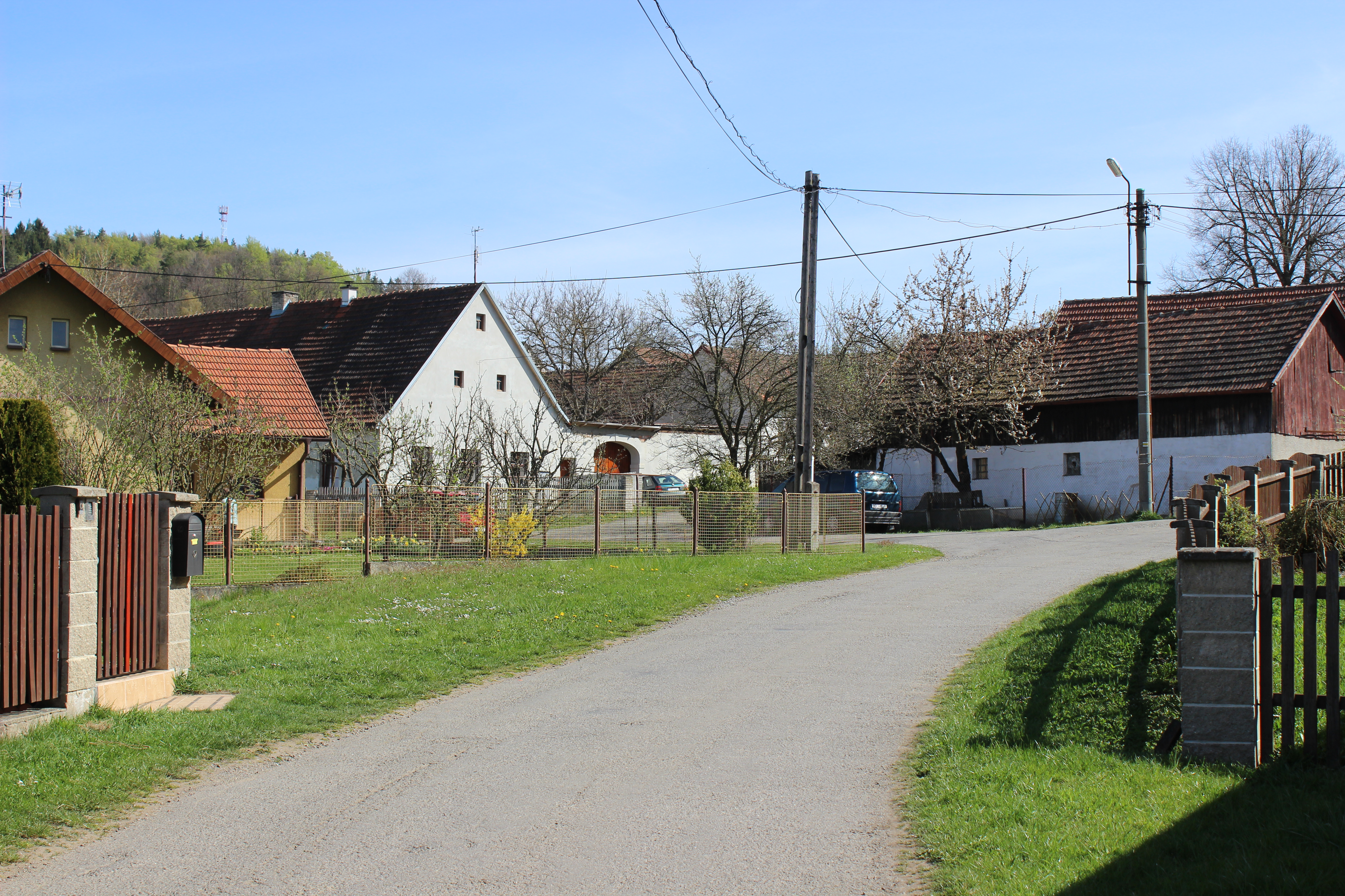 Zástavba v Rovné, části Zajíčkova (pohled od západu). Project: Fotíme Česko.